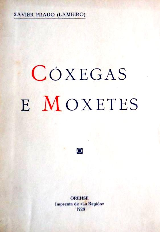 Cóxegas e Moxetes